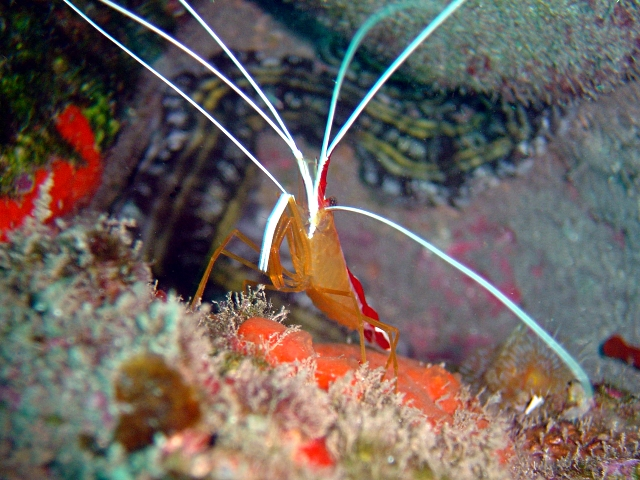 Gamba limpiadora (Lysmata grabhami)